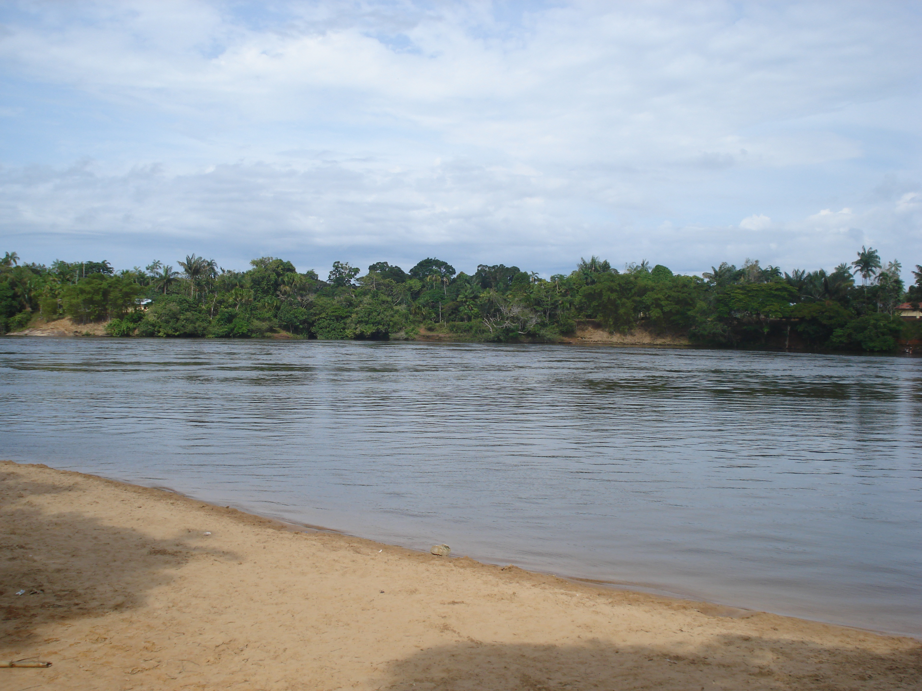 Playa ubicada en Mitu, capital del departamento del Vaupés, sobre el río Vaupés.